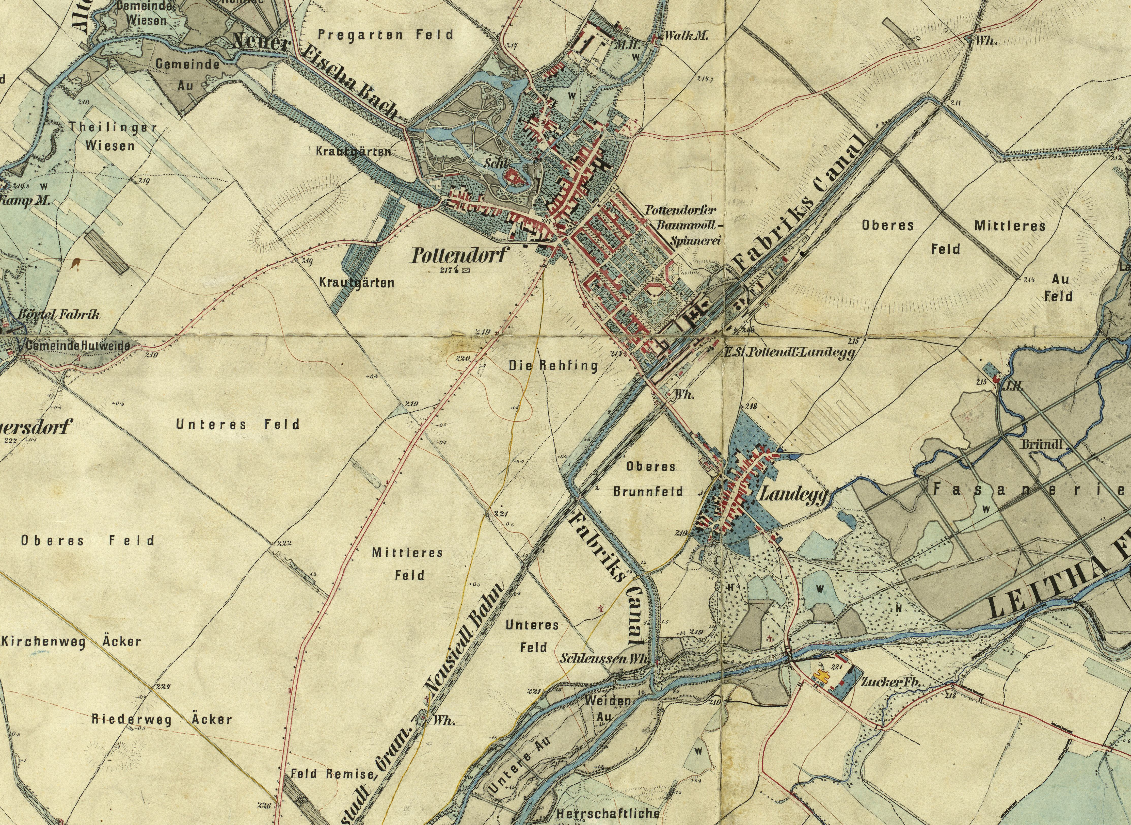 Ausschnitt der historischen Landkarte: Gradkartenblatt Zone 14 Colonne XV Section a3 (später 4857/1c). Pottendorf, Landegg, Wampersdorf in Niederösterreich, Wimpassing an der Leitha, Ebenfurth, Hornstein im Burgenland, Österreich. Franzisco-josephinische (3.) Landesaufnahme der österreichisch-ungarischen Monarchie. Aufnahmeblatt 1:12.500.